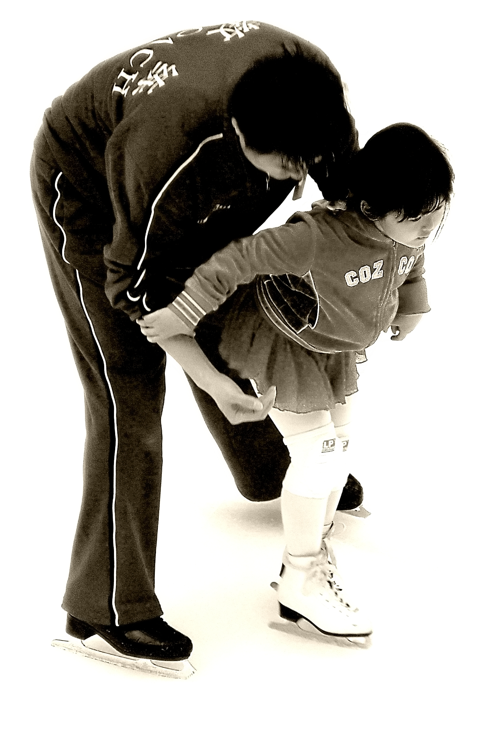 Klizanje na ledu mogu naučiti i djeca.Learning to skate